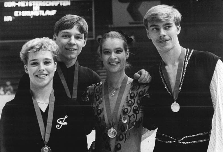 Eiskunstläufer, DDR ADN-ZB Thieme 12.12.1987 Karl-Marx-Stadt: DDR-Meisterschaften im Eiskunstlaufen.- Titelträger wurden Katarina Witt (SC Karl-Marx-Stadt, M.) zum achten Mal in Reihenfolge. Michael Huth (SC Einheit Dresden, r.) und im Paarlaufen Peggy Schwarz und Alexander König -SC Dynamo Berlin).